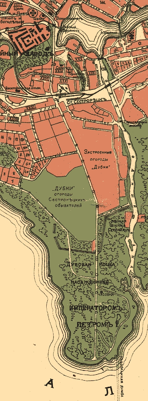 Карта Сесторецка начала ХХ века